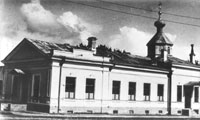 Vladimiri vennaste koguduse kirik Narvas